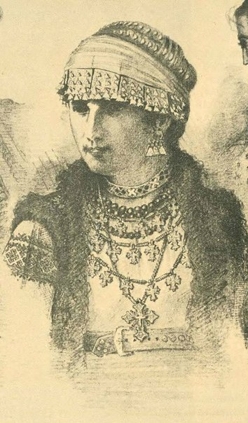 Женщина с згардами